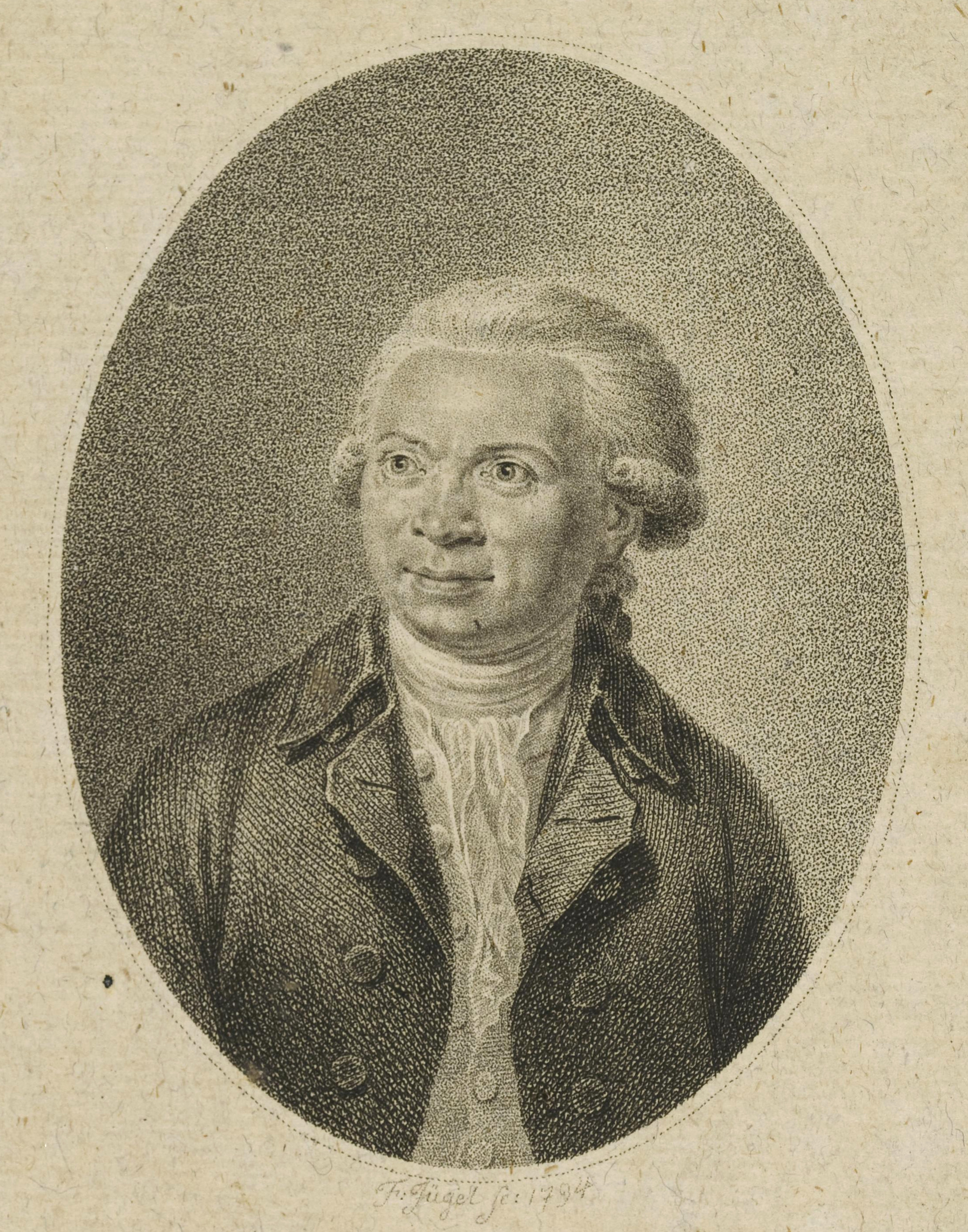 Johann Abraham Peter Schulz, Frontispiz des 26. Bandes, 1.-4. Heft, der Neuen allgemeinen deutschen Bibliothek, Kiel 1796